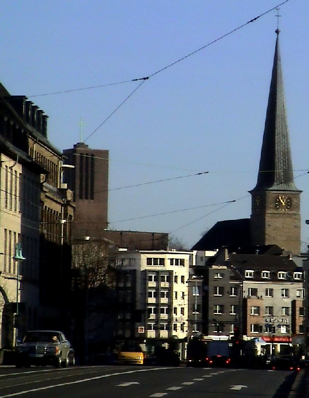 Beschreibung: Mülheim an der Ruhr: Mülheim-Stadtmitte von der Schlossbrücke aus gesehen. Hinten links die Marienkirche und rechts die Petrikirche. Quelle: Benutzer:W.wolny selbst fotografiert am 15. Januar 2005 2005-01-15 20:40:53 (Diskussion) . . 622 x 800 (91500 Byte) Lizenz